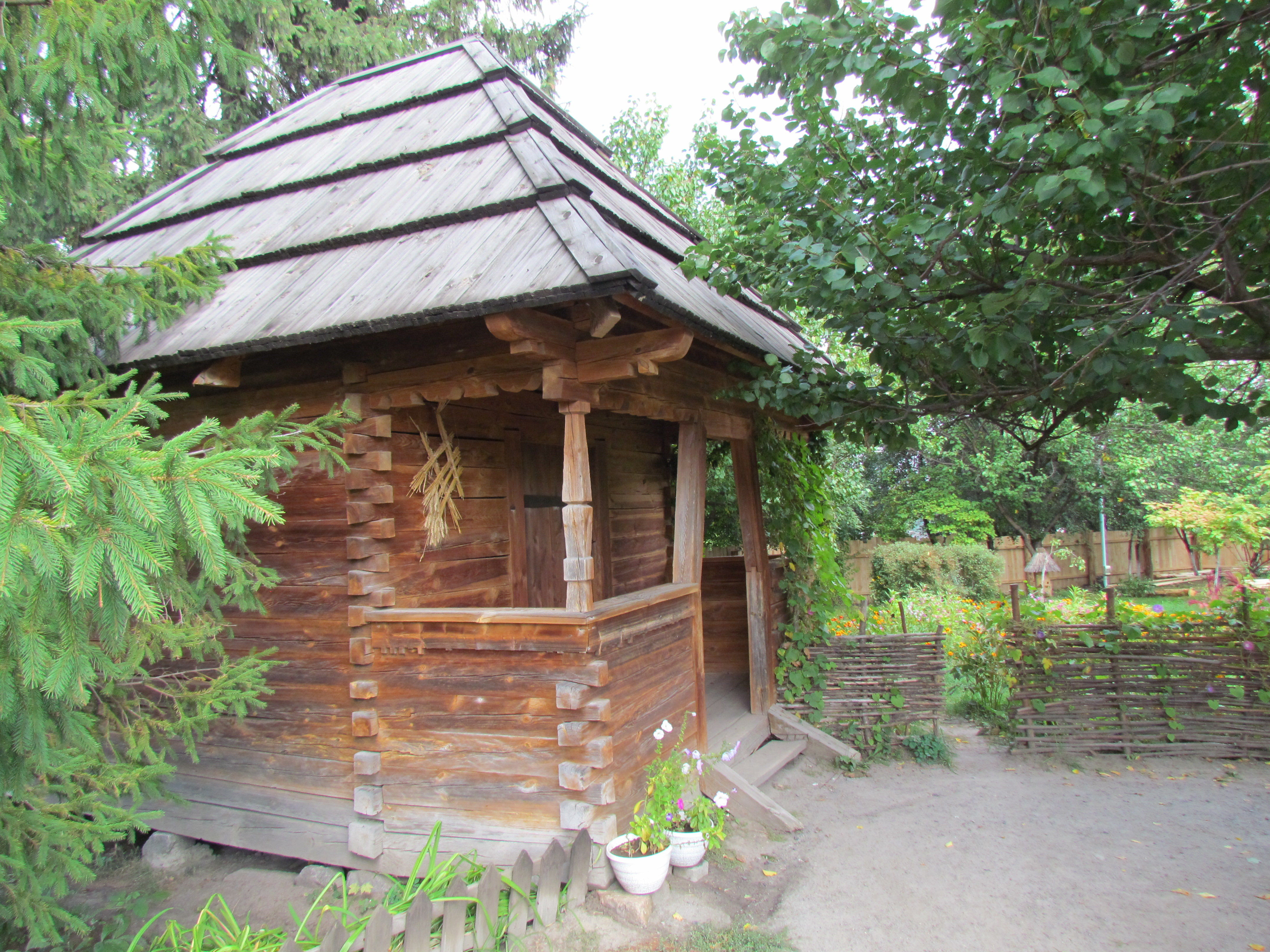 Повітка (Меморіальний комплекс – садиба письменника І. П. Котляревського)